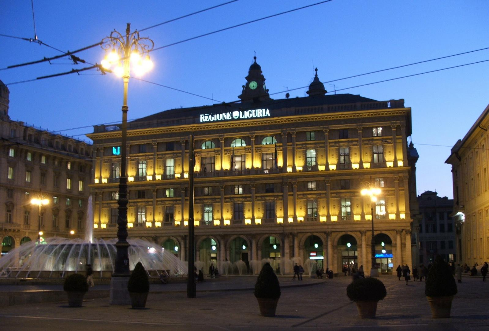 Immagine da Genova